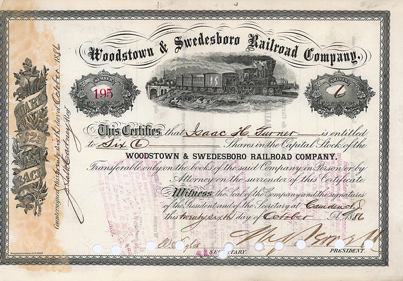 Aktie der Woodstown and Swedesboro Railroad Company vom 26. Oktober 1886